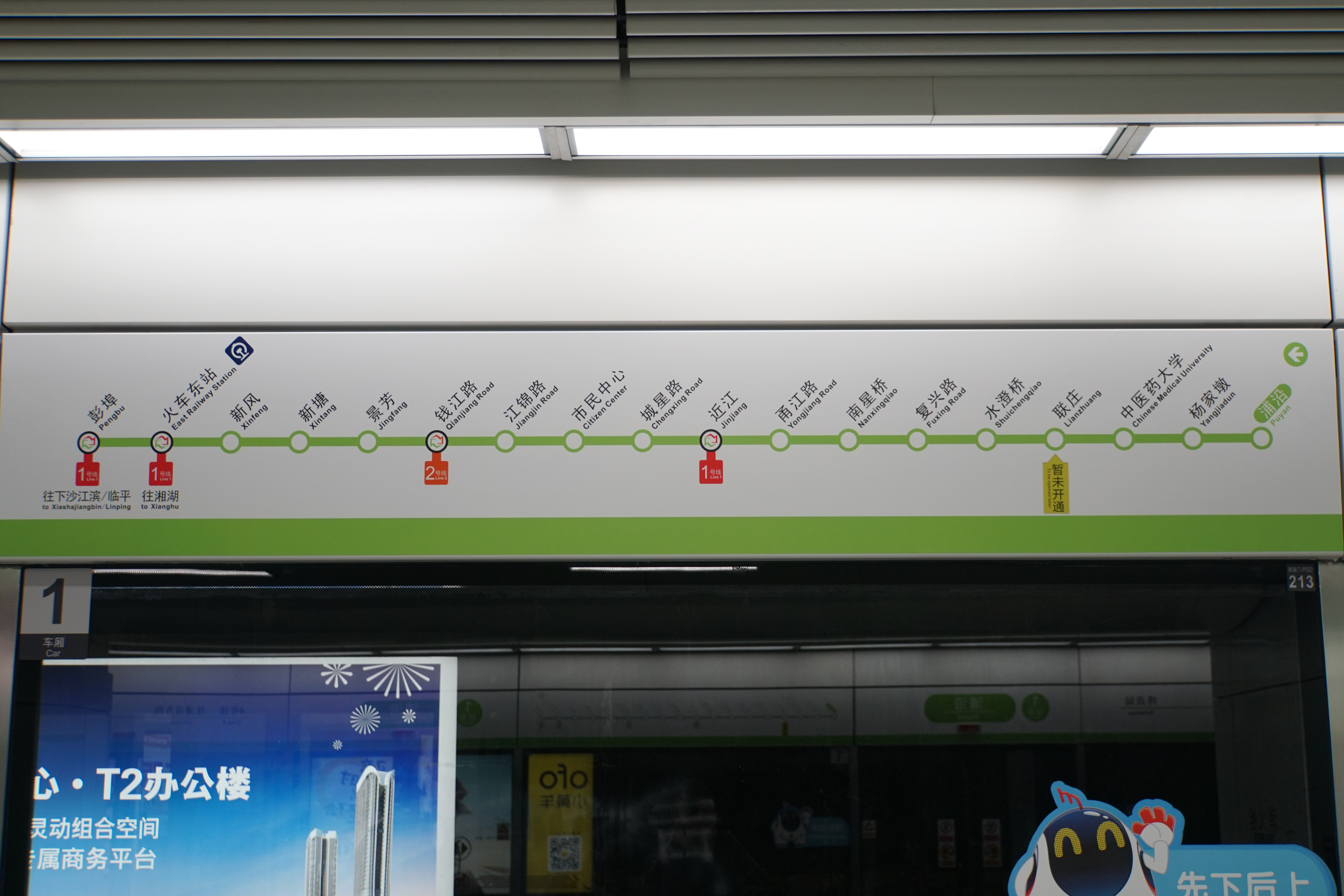 4号线站名表（摄于浦沿站）